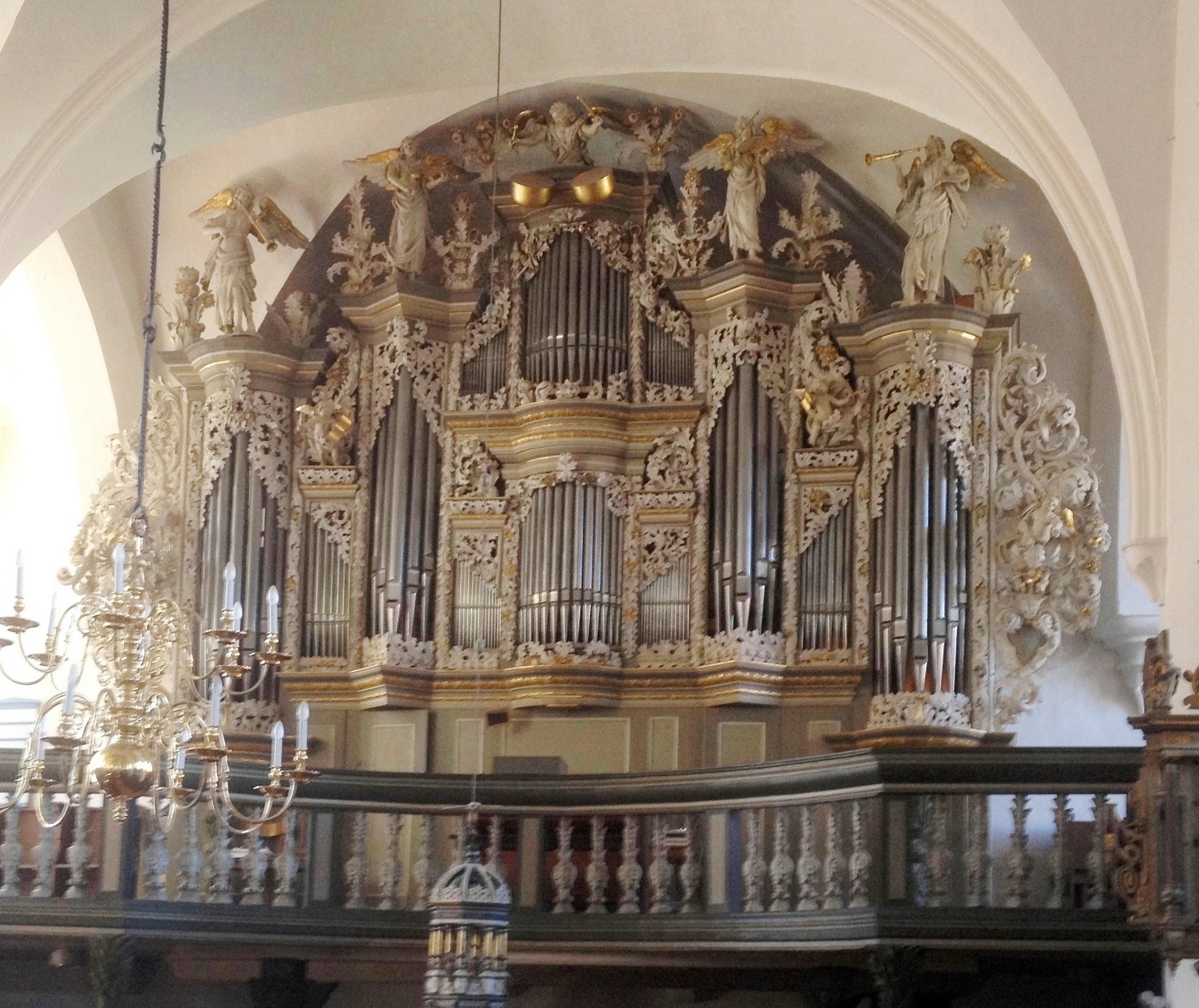 Hornburg, ev.-luth. Kirche, Orgel